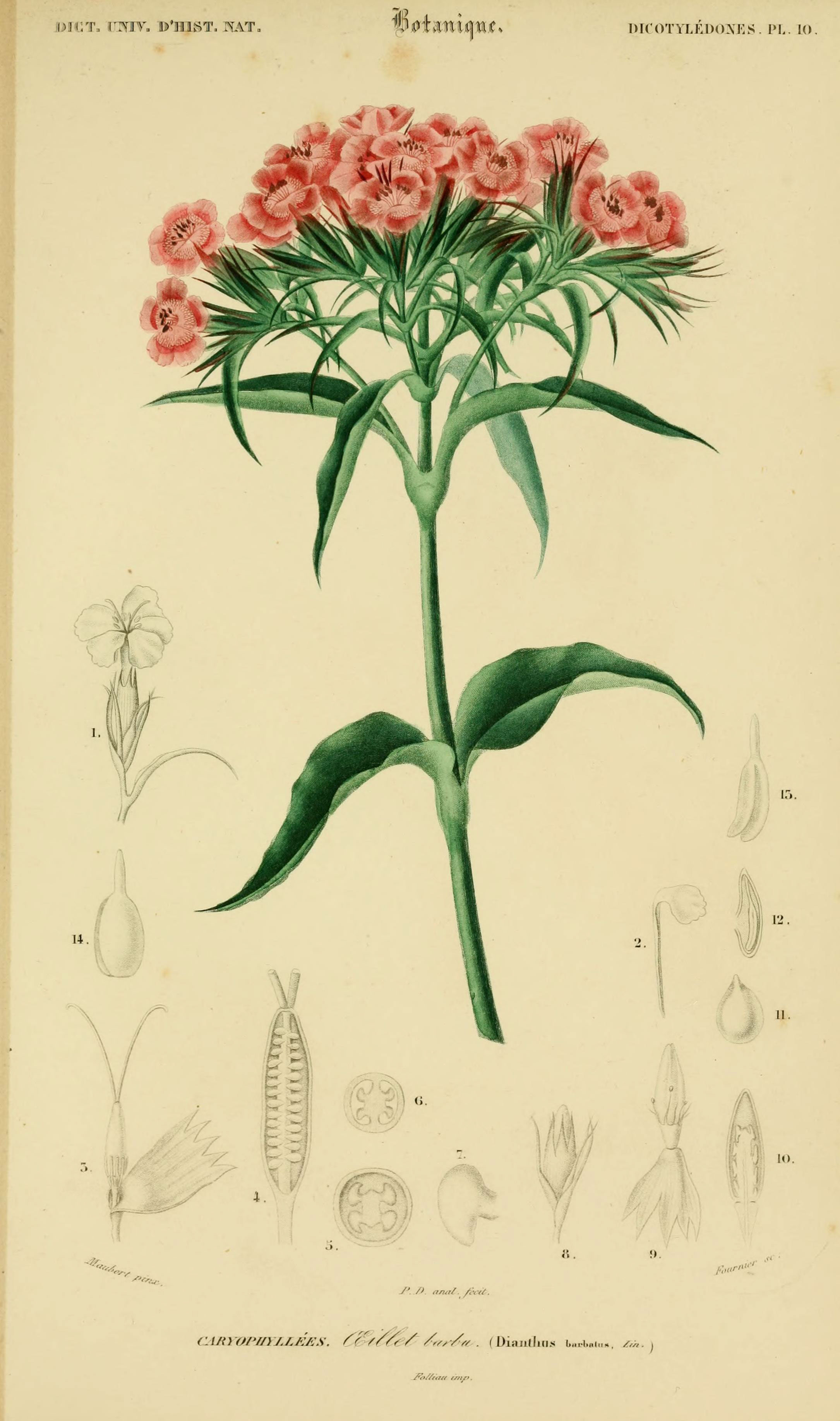 Ojr.T, l'TiTV'. D'ni.ST. X-\T. iWiani(